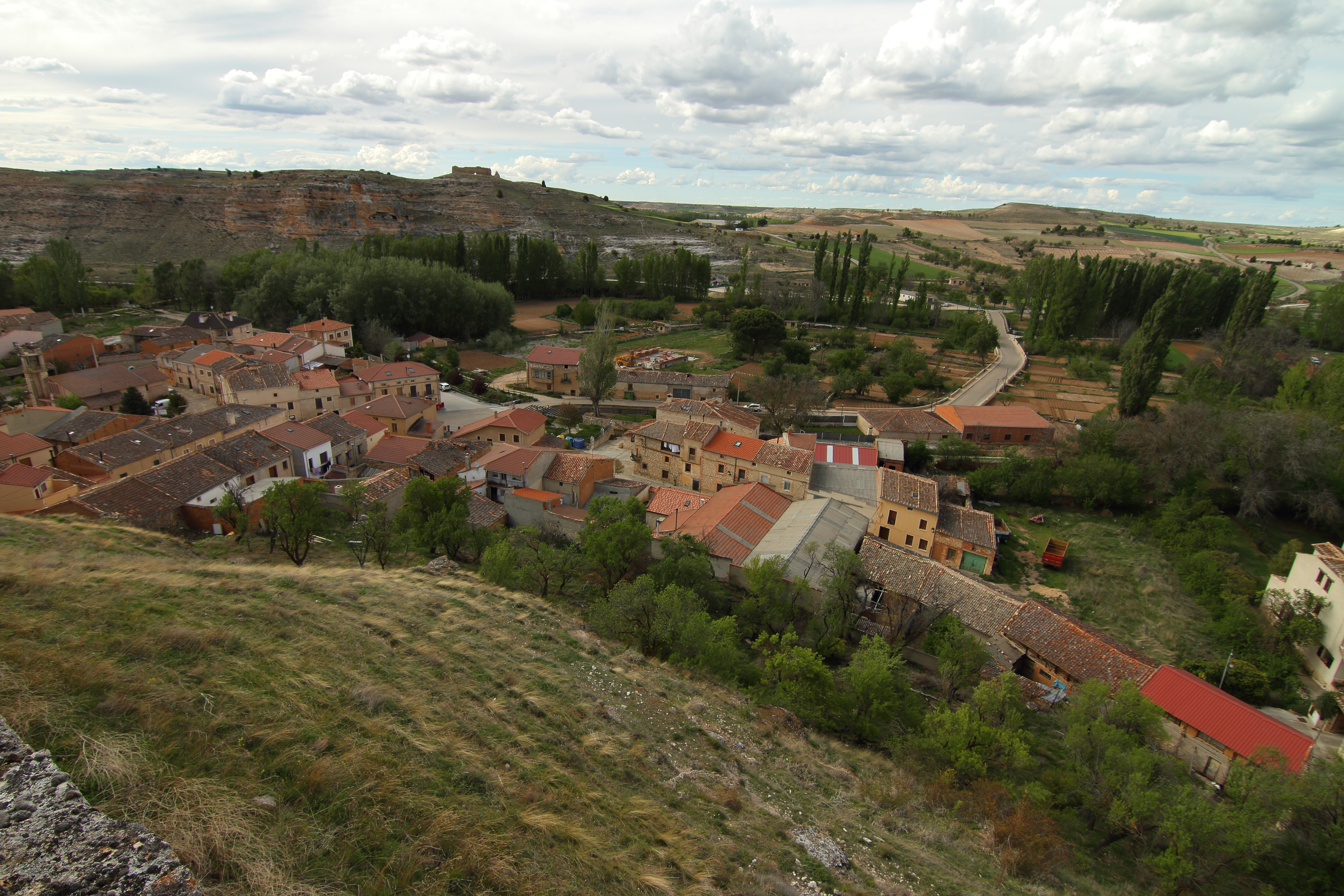 Montejo de la Vega de la Serrezuela, 01